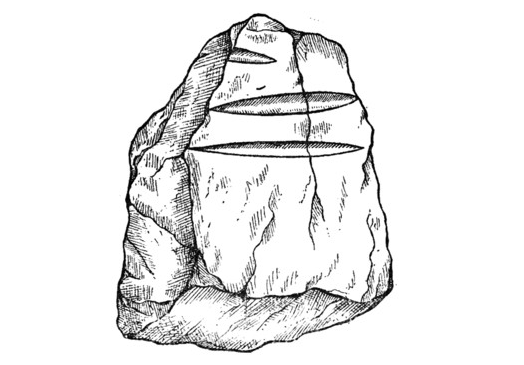 Croquis représentant le polissoir fixe de Saint-Cyr-sur-Loire